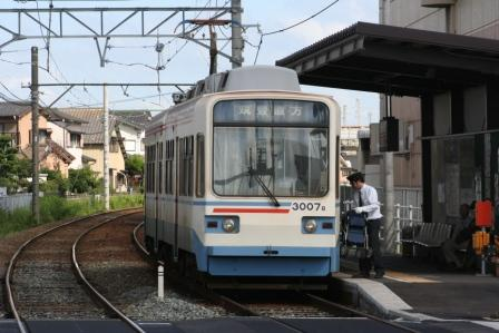 木屋瀬駅に停車中の3000形電車